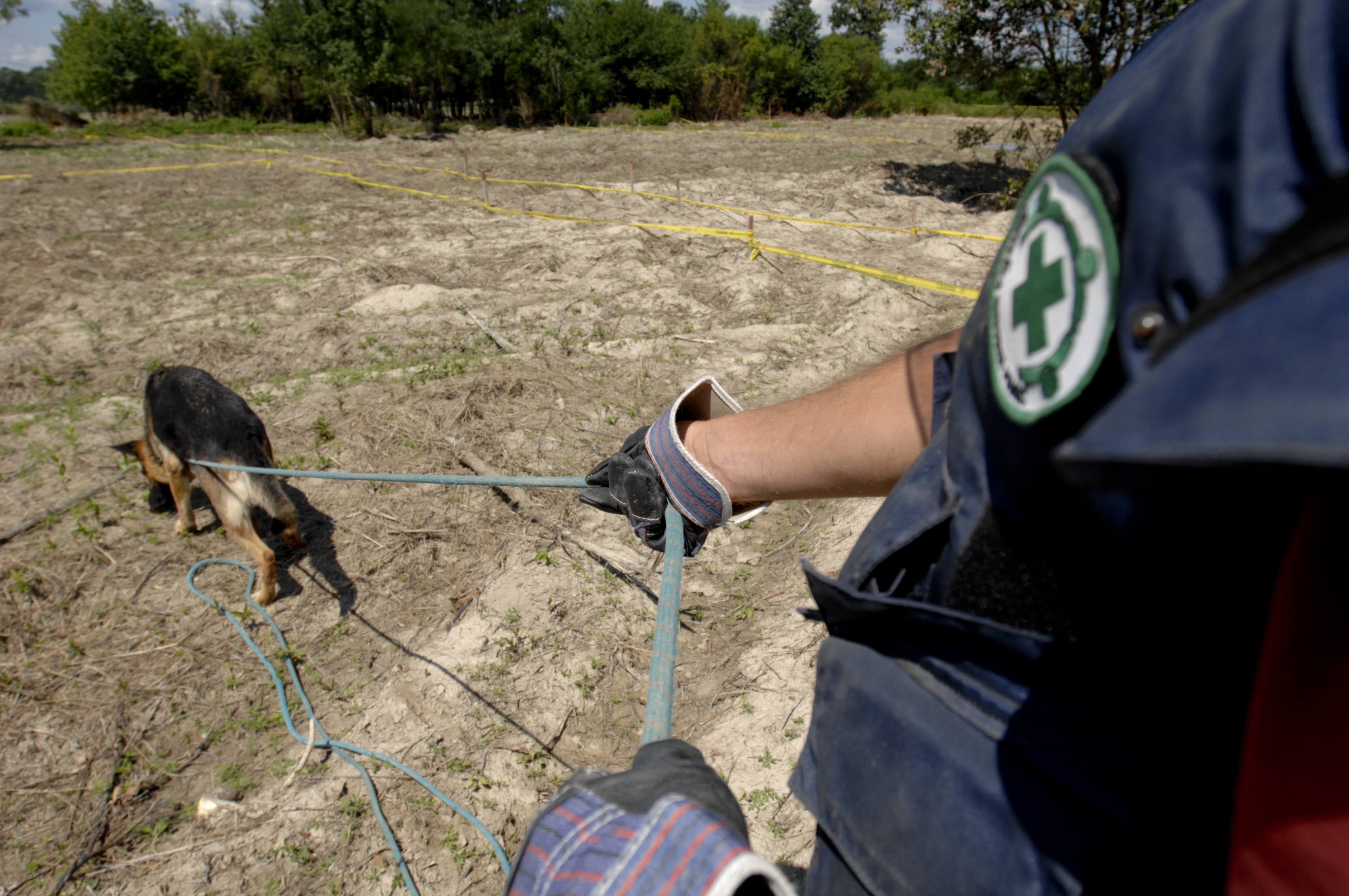 En minehund og en fører på jobb for Norsk Folkehjelp i Bosnia-Hercegovina Foto: Werner Anderson